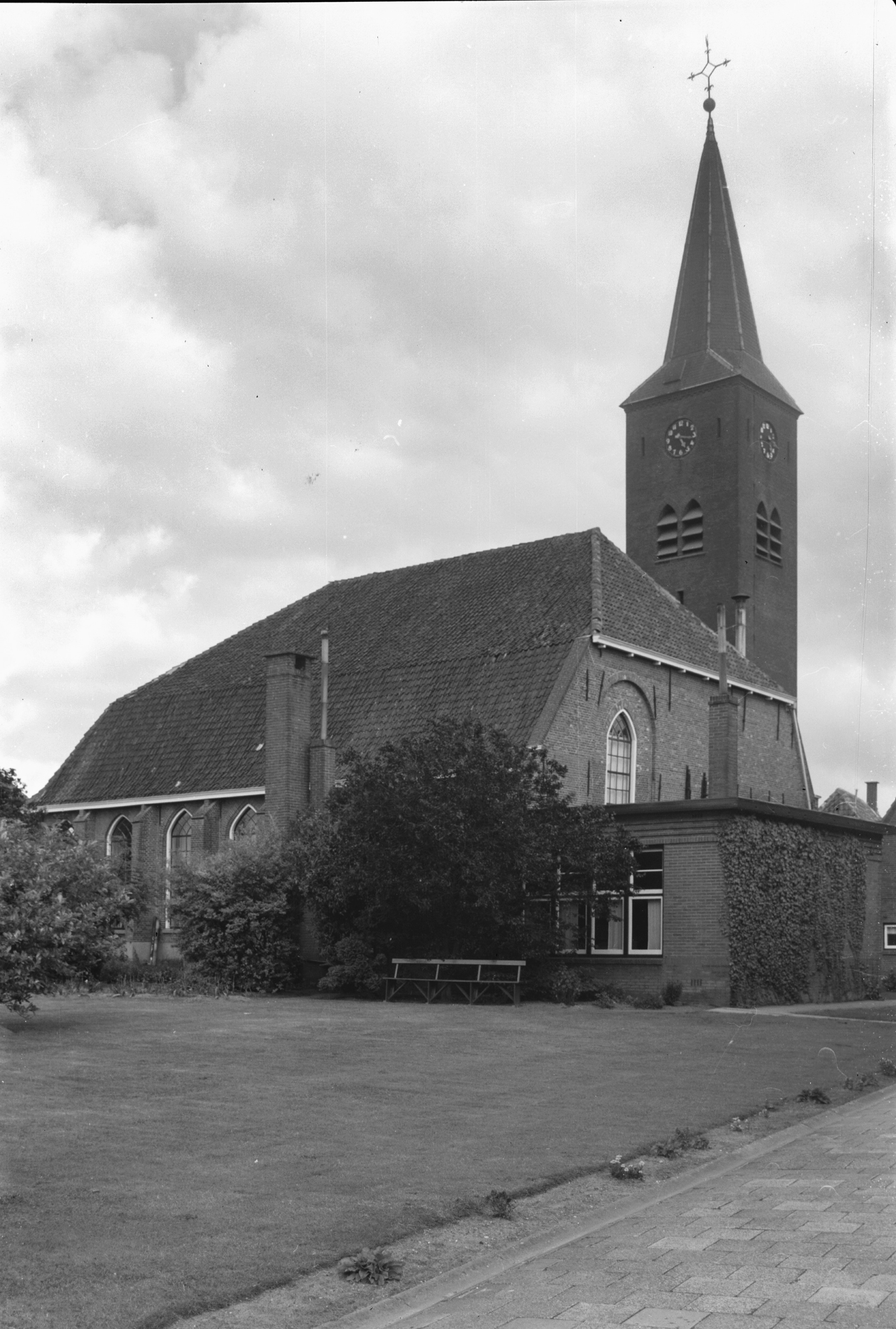 Nederlands Hervormde Kerk: kerk, exterieur